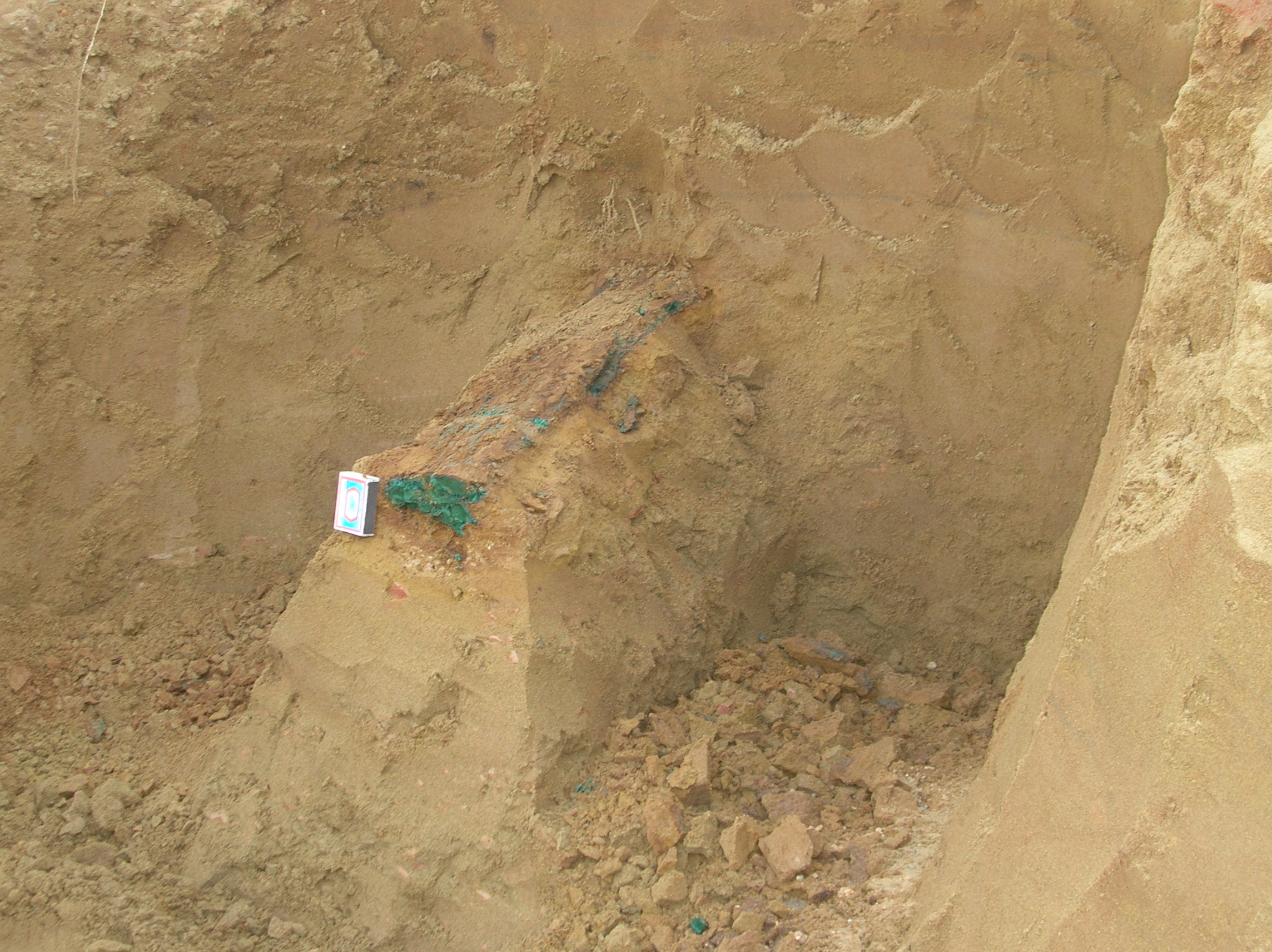 Фото гнезда волконскоита в песчаной толще у деревни Сибирь Унинского района Кировской области. Волконскоит замещает собой захороненный в песке кусок древесины.